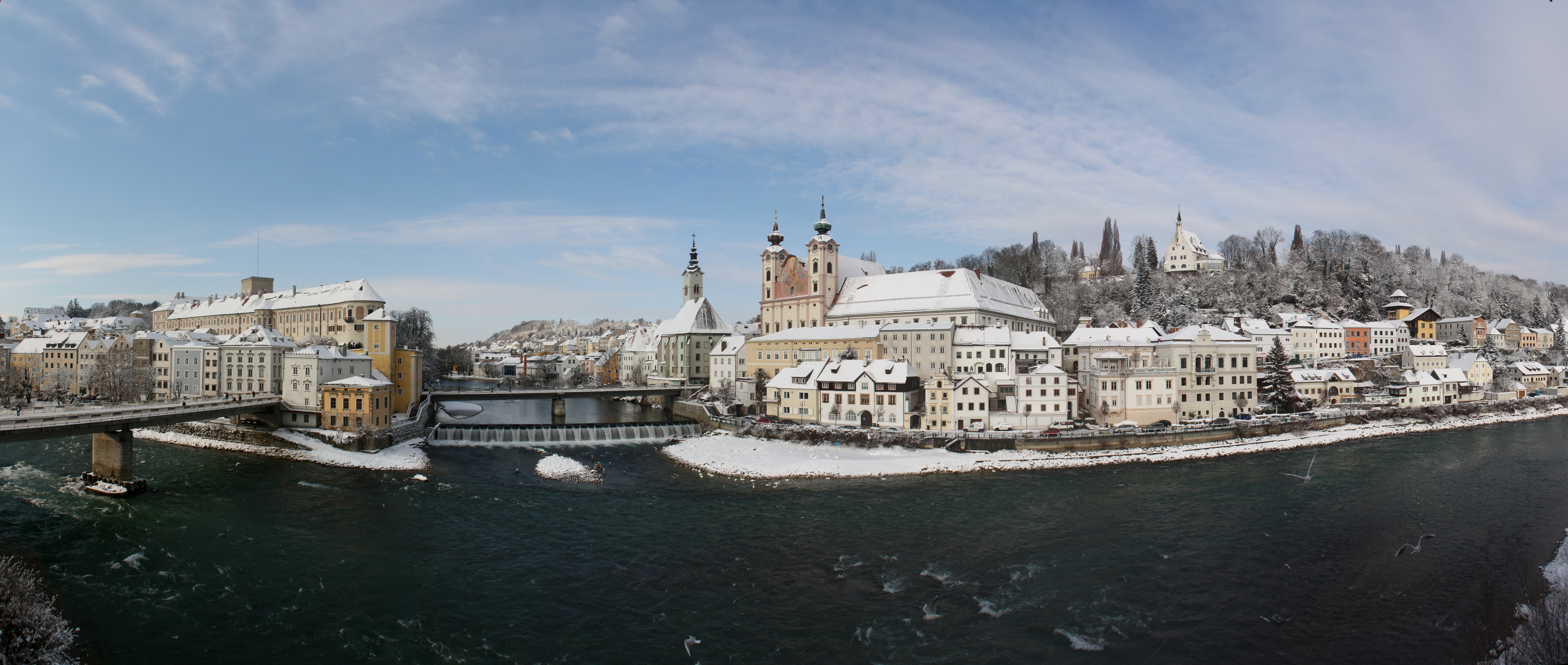 Steyr Panorama Winter